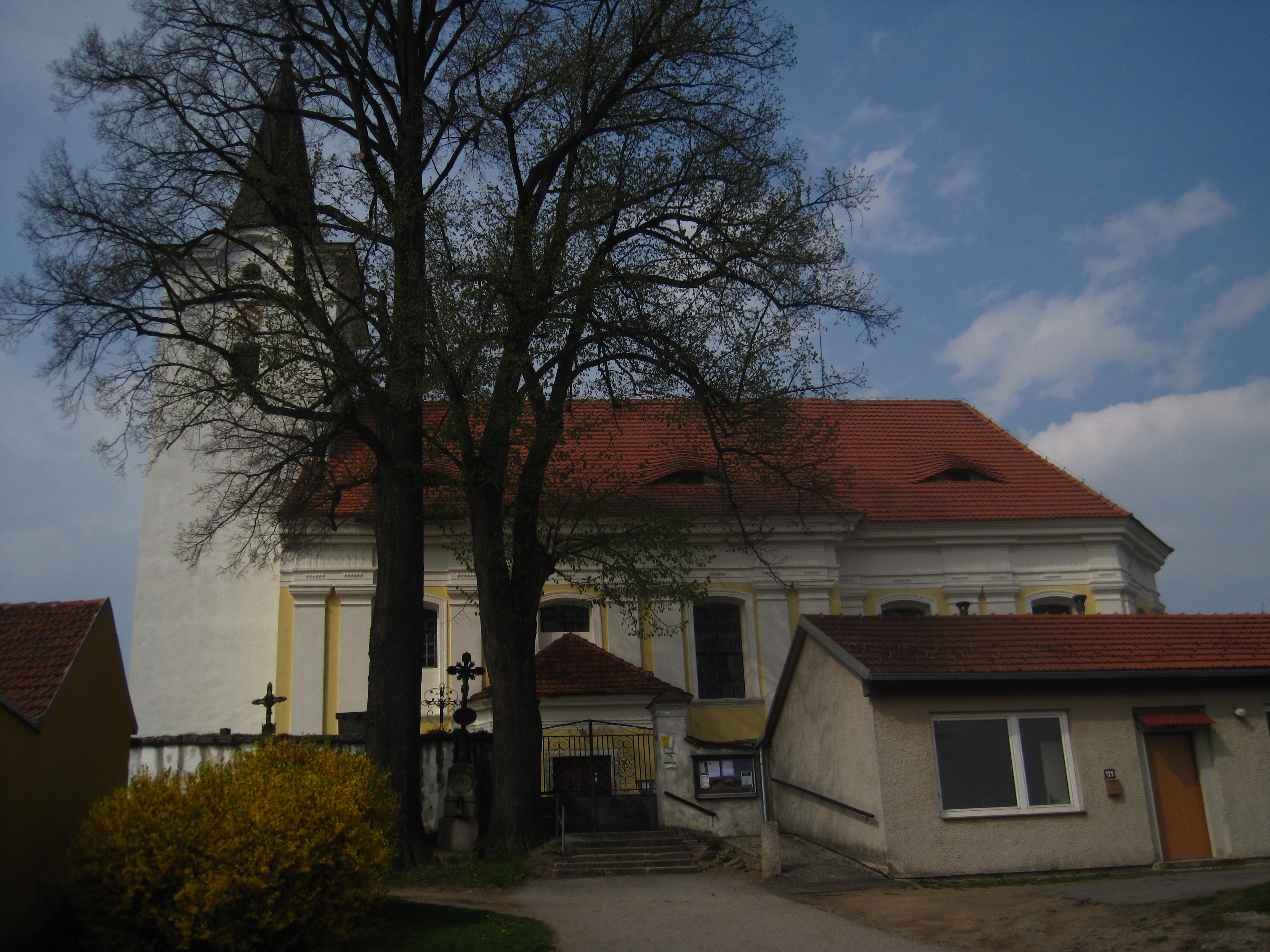 Kostel svatého Mikuláše, Soběnov.